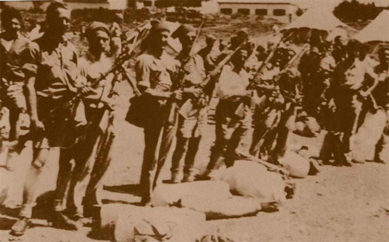 לוחמי הגדוד הרביעי של הפלמ"ח בקרבות הדרך לירושלים 1948 ארכיון ההגנה